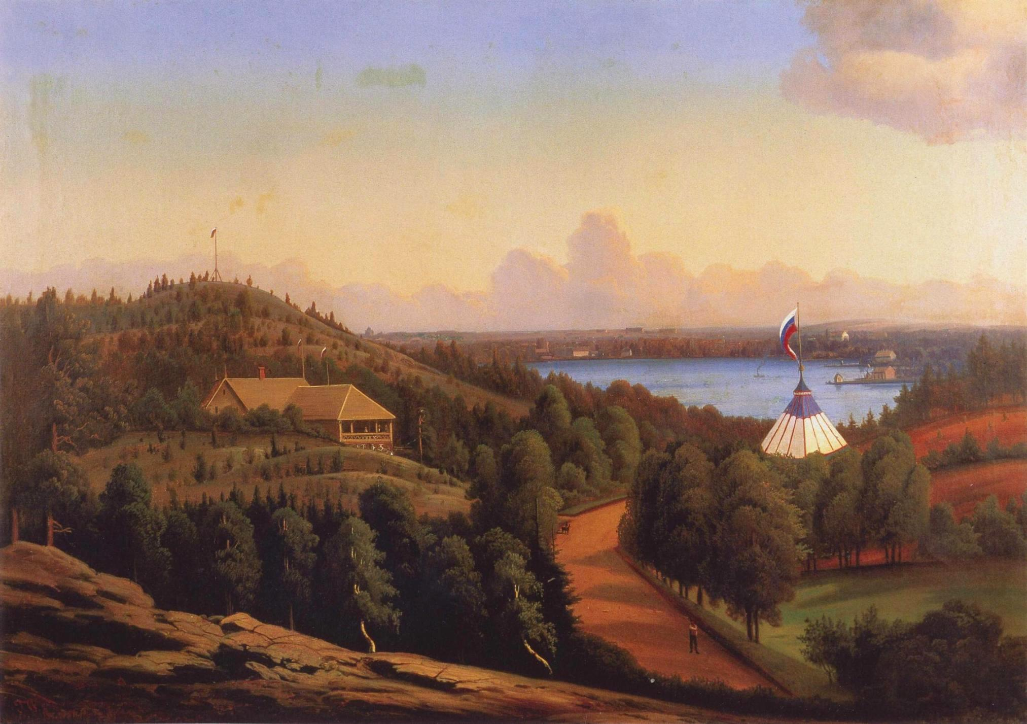 Thorsten Waenerbergin maalaus Helsingin nykyisen Alppipuiston alueesta. Tien oikealla puolella Venäjän keisariperheen vierailun kunniaksi rakennettu keisaripaviljonki, vasemmalla puolella ravintola Alppila. Taustalla Linnanmäki ja Töölönlahti. Teoksen omistaa Helsingin kaupunginmuseo.